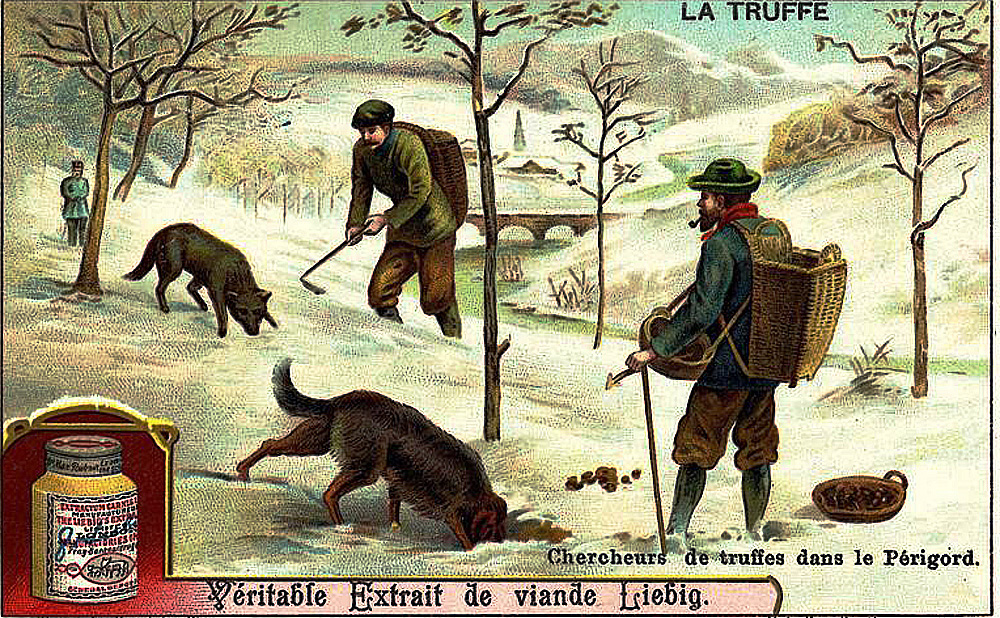 Cherheurs de truffes dans le Périgord